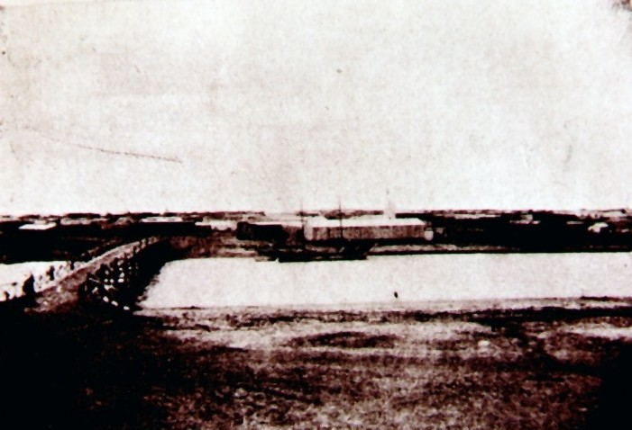 Rawson, Chubut, Argentina - Viejo puente de madera (hoy destruído)